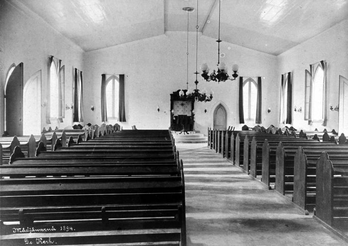 Repronegatief. Interieur van een kerk, Madjawarna nabij Soerabaja, Java